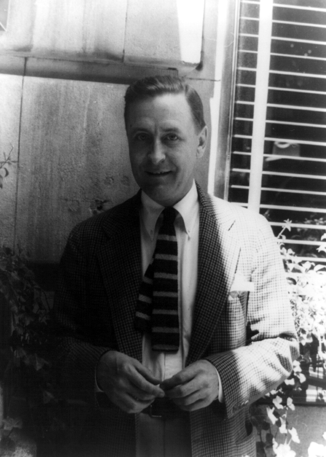 F. Scott Fitzgerald, 1937, June 4